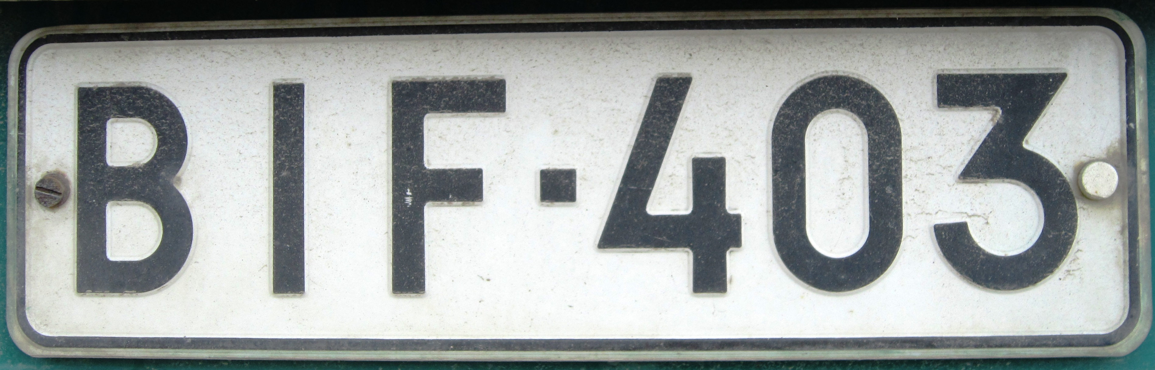 Finland kentekenplaat oud